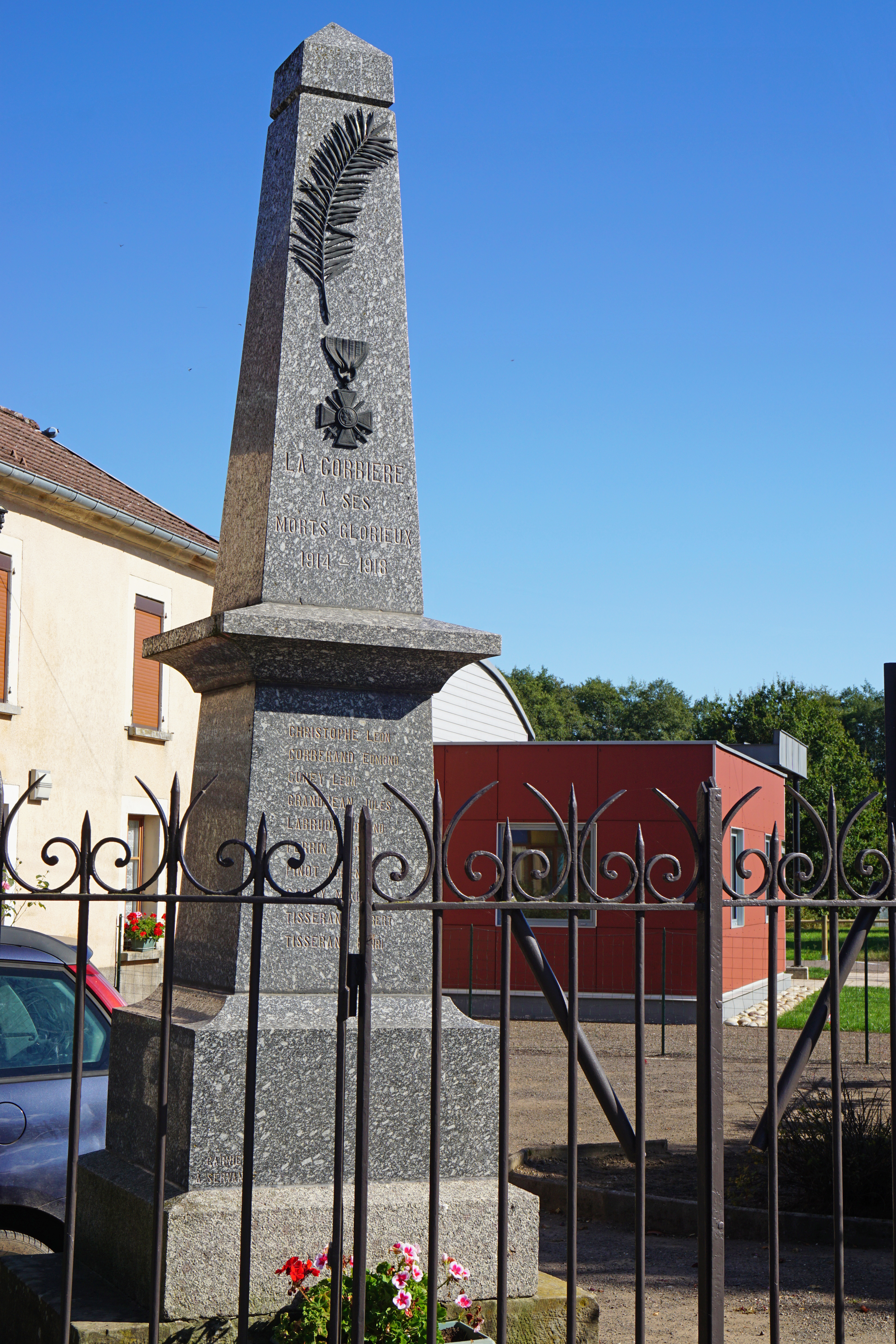 Le monument aux morts de La Corbière.